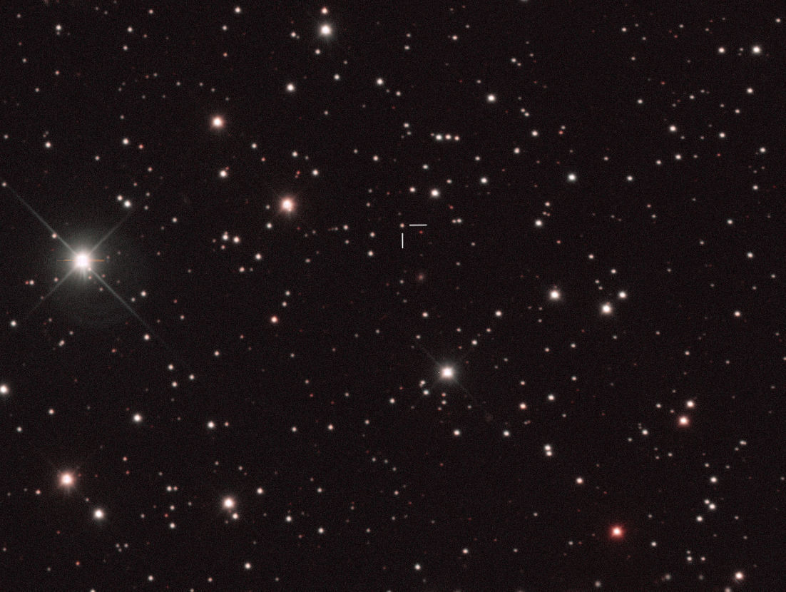 Himlen omkring svarta hålet 1A 0620-00 i stjärnbilden Enhörningen. Bilden är skapad av exponeringar i synligt och infrarött ljus från Sloan Digital Sky Survey. Bilden är ca 8 bågminuter bred.